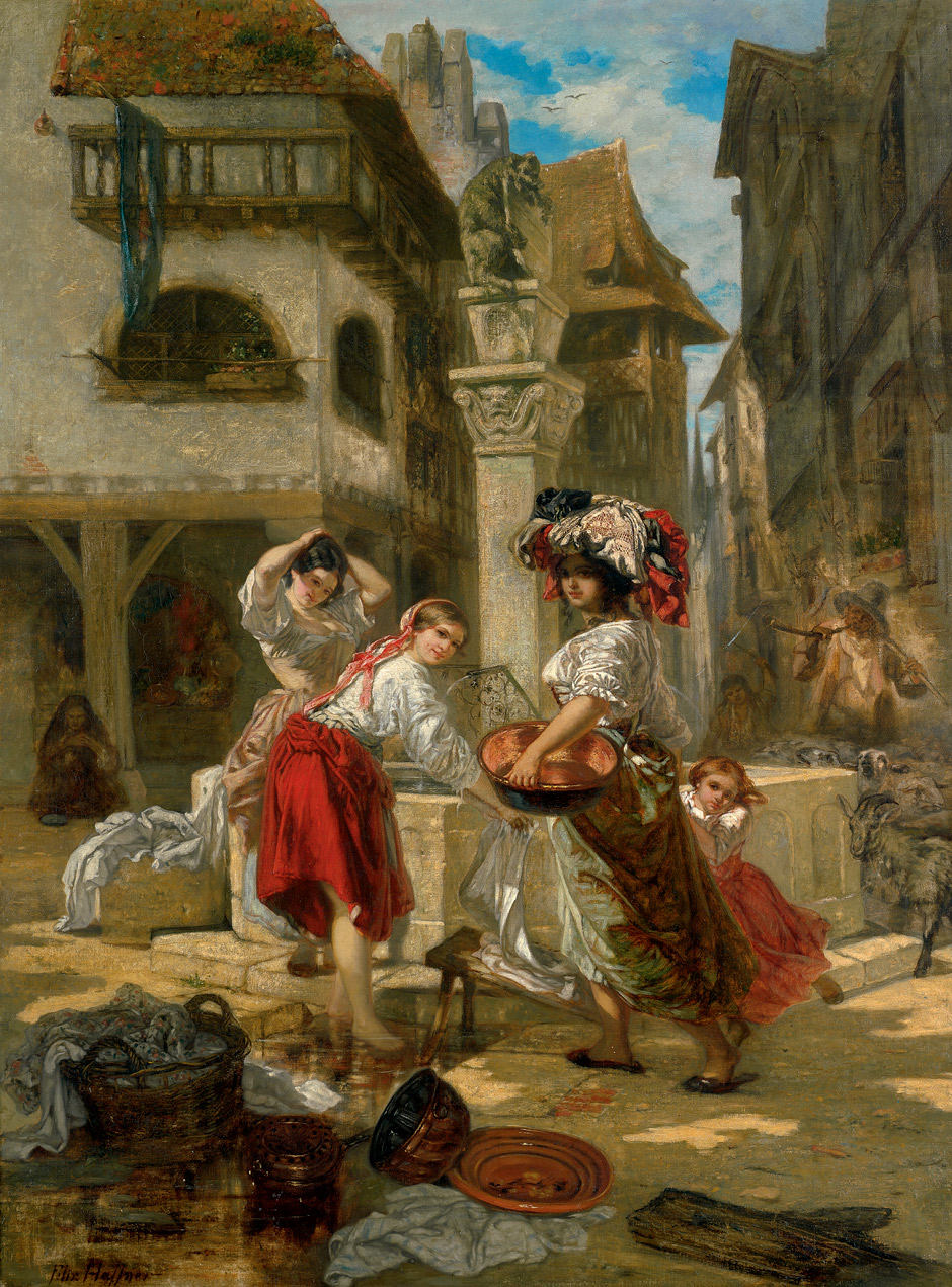 Drei Mädchen am Brunnen (in einer elsässischen Stadt?). Öl auf Leinwand. 131 x 98 cm. Unten links signiert "Felix Haffner". Provenienz: Aus dem Besitz von Eugénie de Montijo (1826-1920), Auktion Sotheby's, Amsterdam, am 15. April 2003, Los 84.